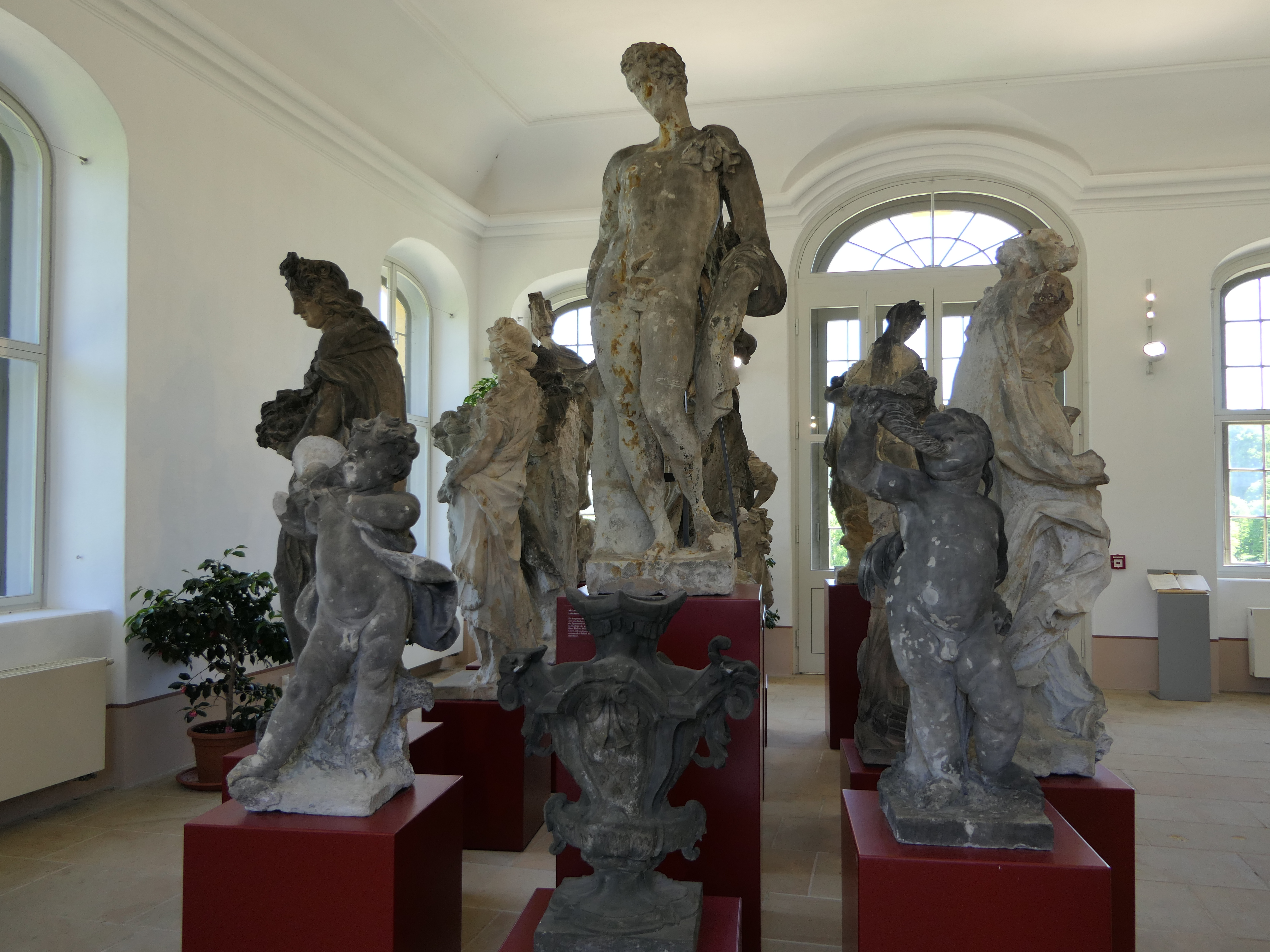 Originale, konservierte Skulpturen im Kopfbau der Oberen Orangerie im Barockgarten Grosssedlitz